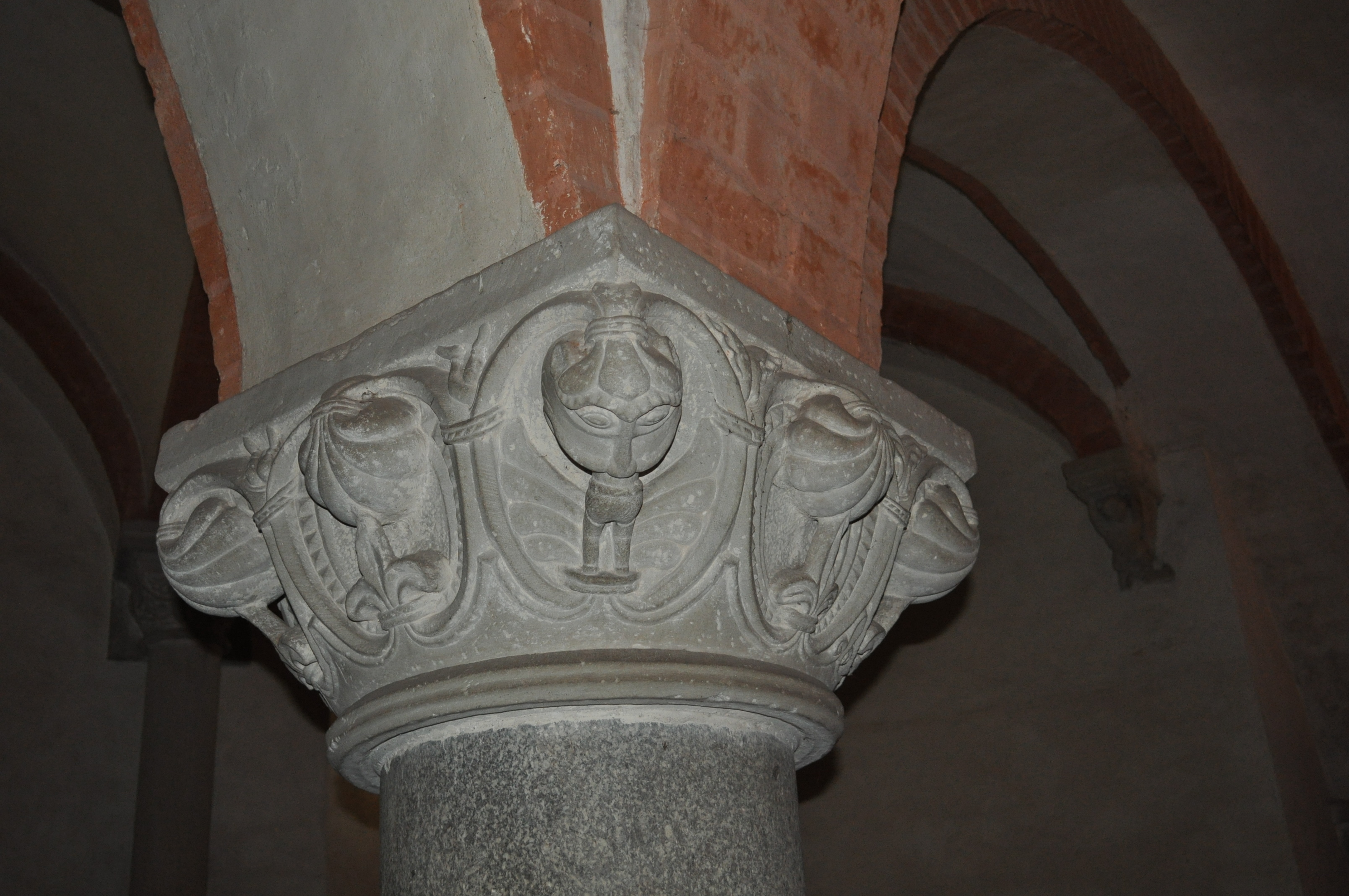 Kapitell, Kloster Jerichow